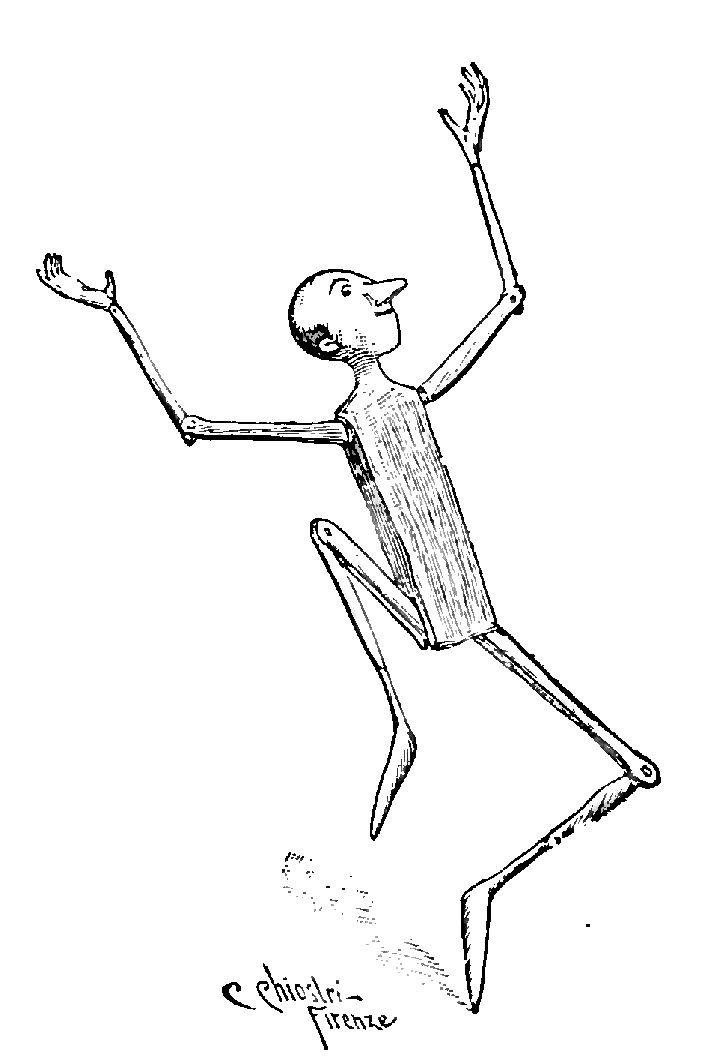 Illustrations from "Le avventure di Pinocchio, storia di un burattino", Carlo Collodi, Bemporad & figlio, Firenze 1902 (Drawings and engravings by Carlo Chiostri, and A. Bongini)